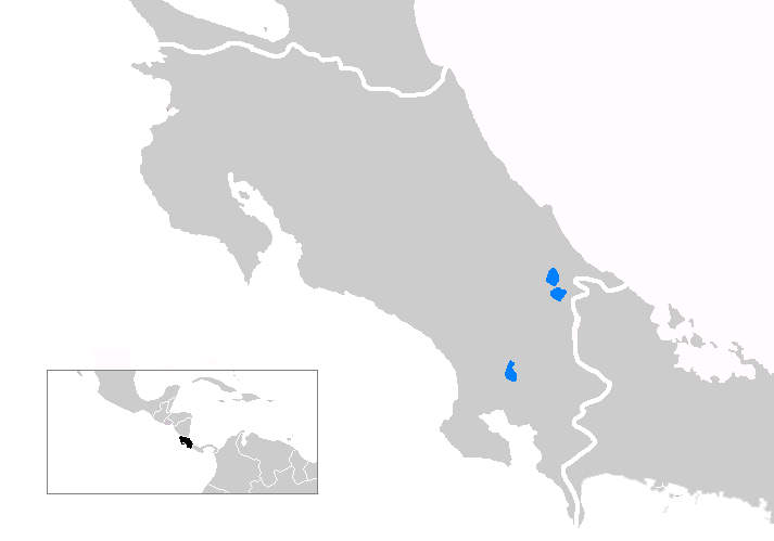 Mapa de las comunidades bribris de Costa Rica. Autor: Sergio Arroyo (Ornitorrinco) All rights released